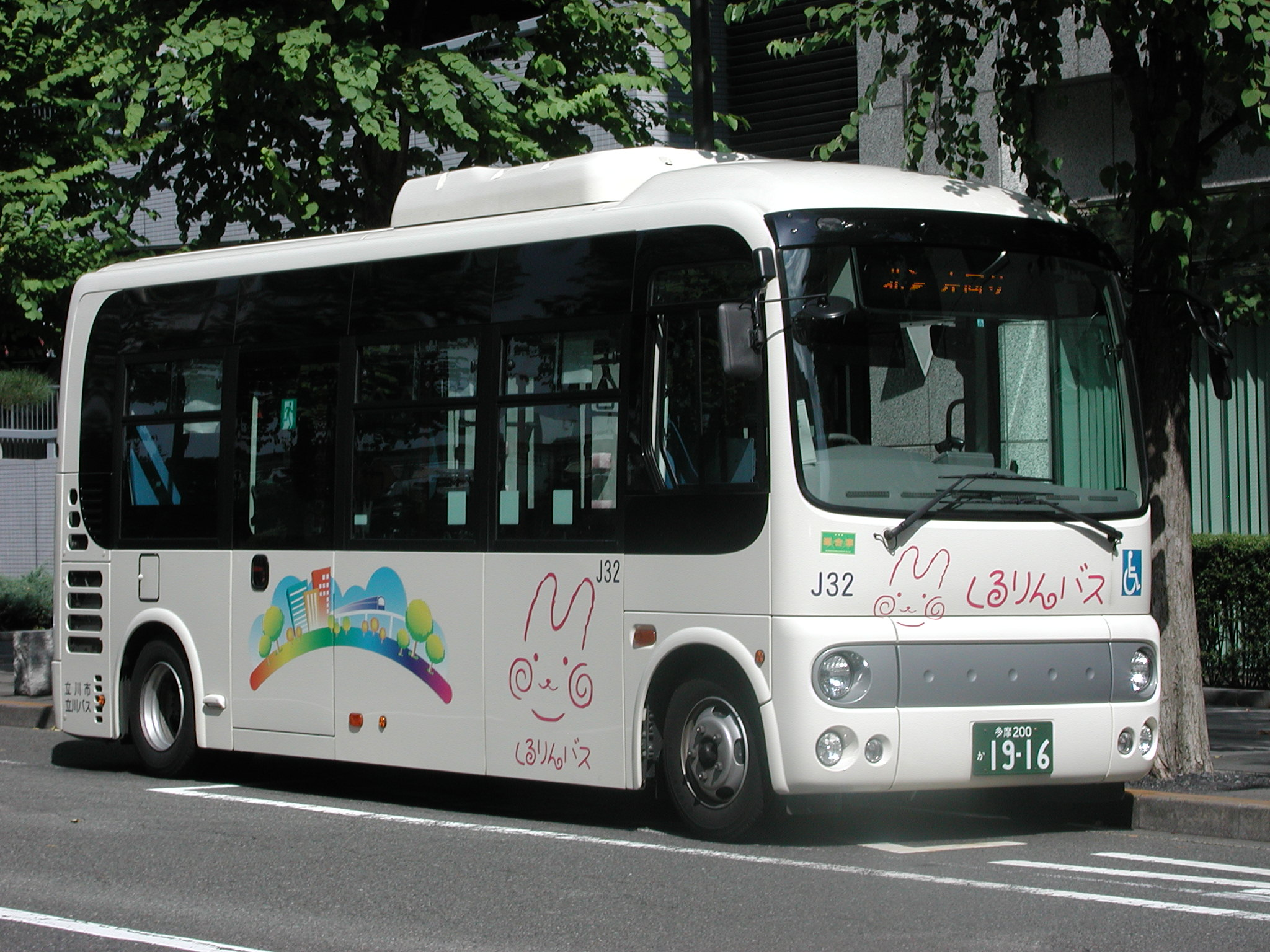 「立川市民バス『くるりんバス』」専用車両（日野・ポンチョロングボディ：BDG-HX6JLAE/立川バス上水営業所所属：社番・J32） 女性総合センターにて